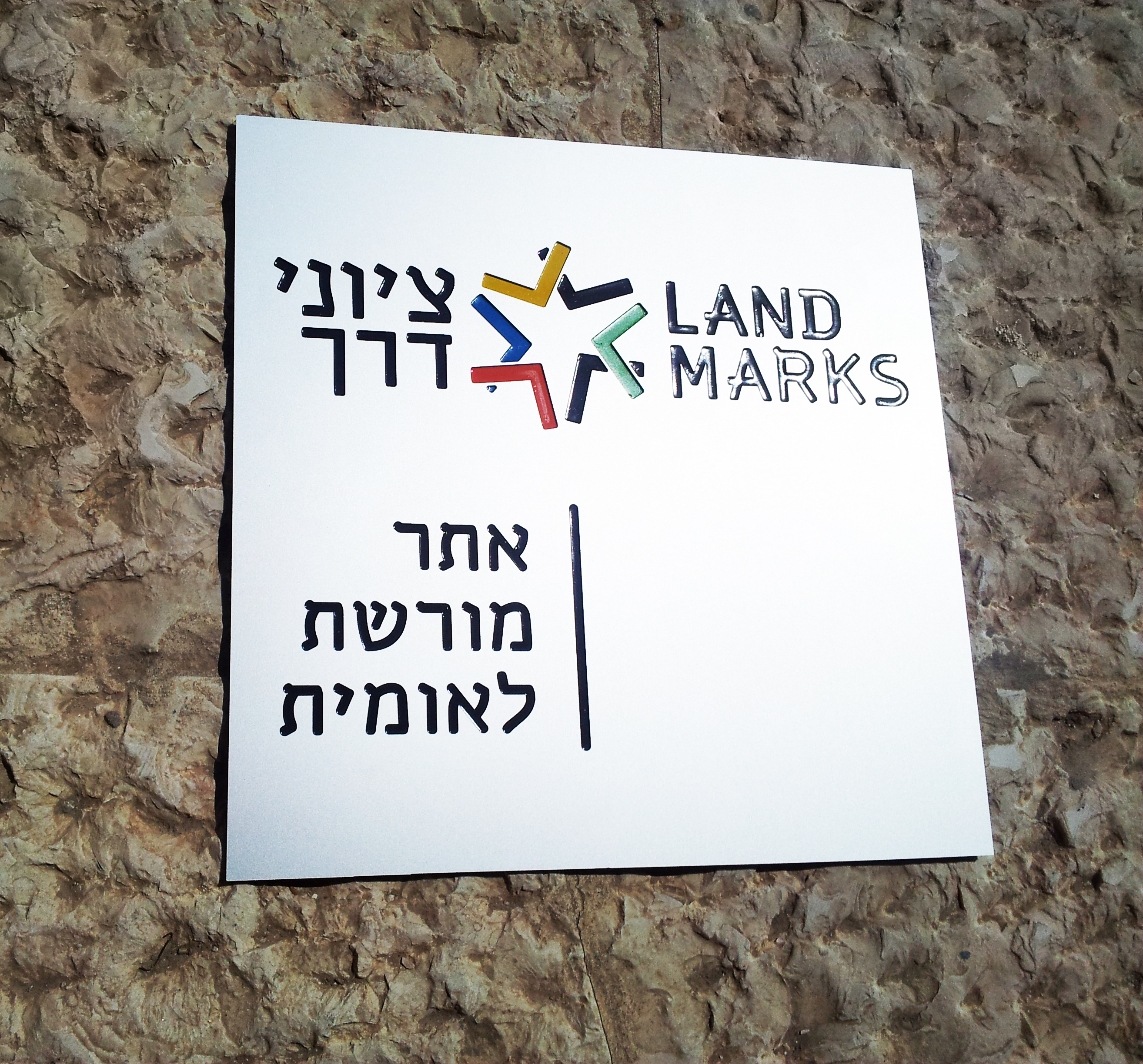 שלט אתר מורשת לאומית